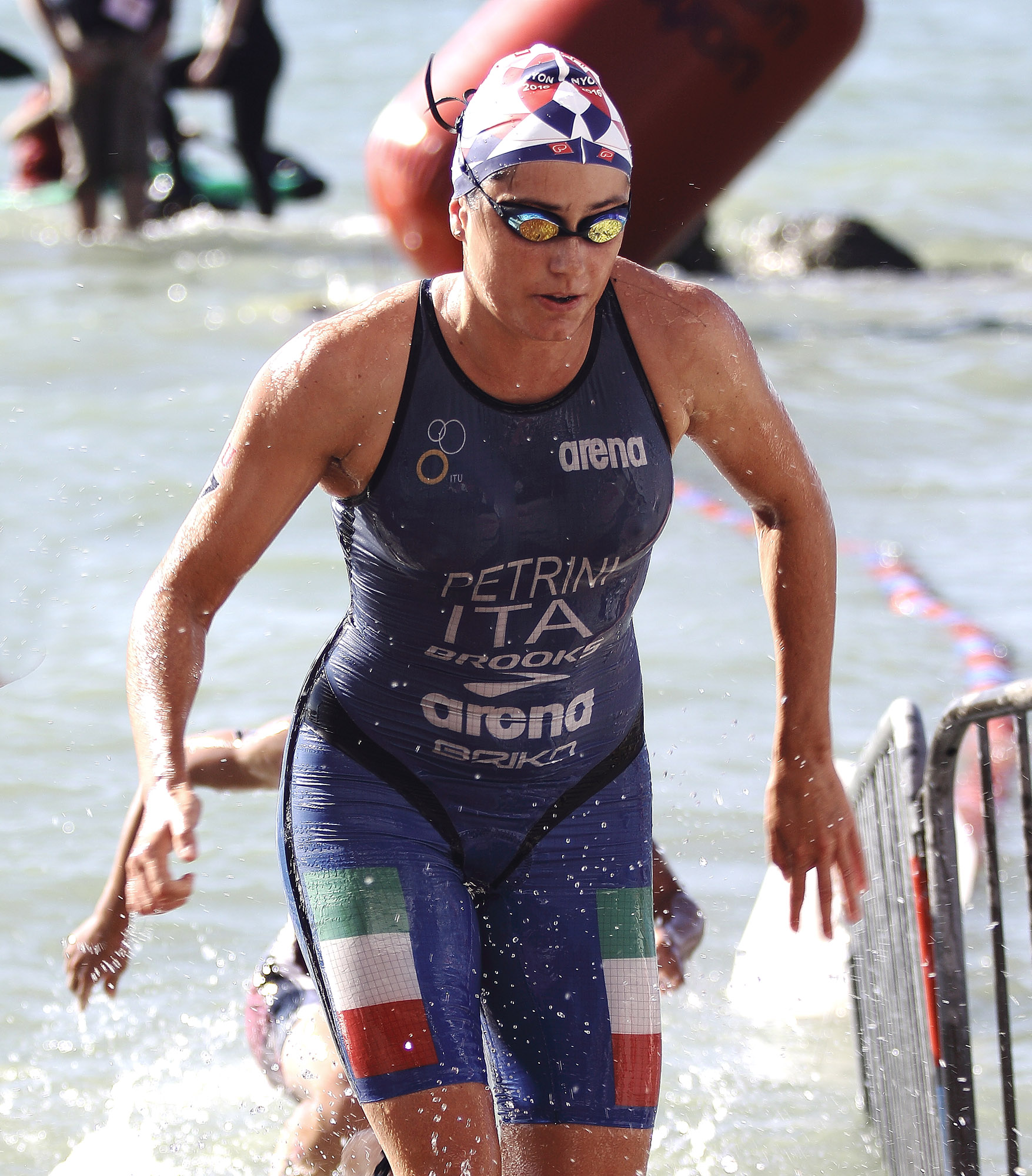 ee